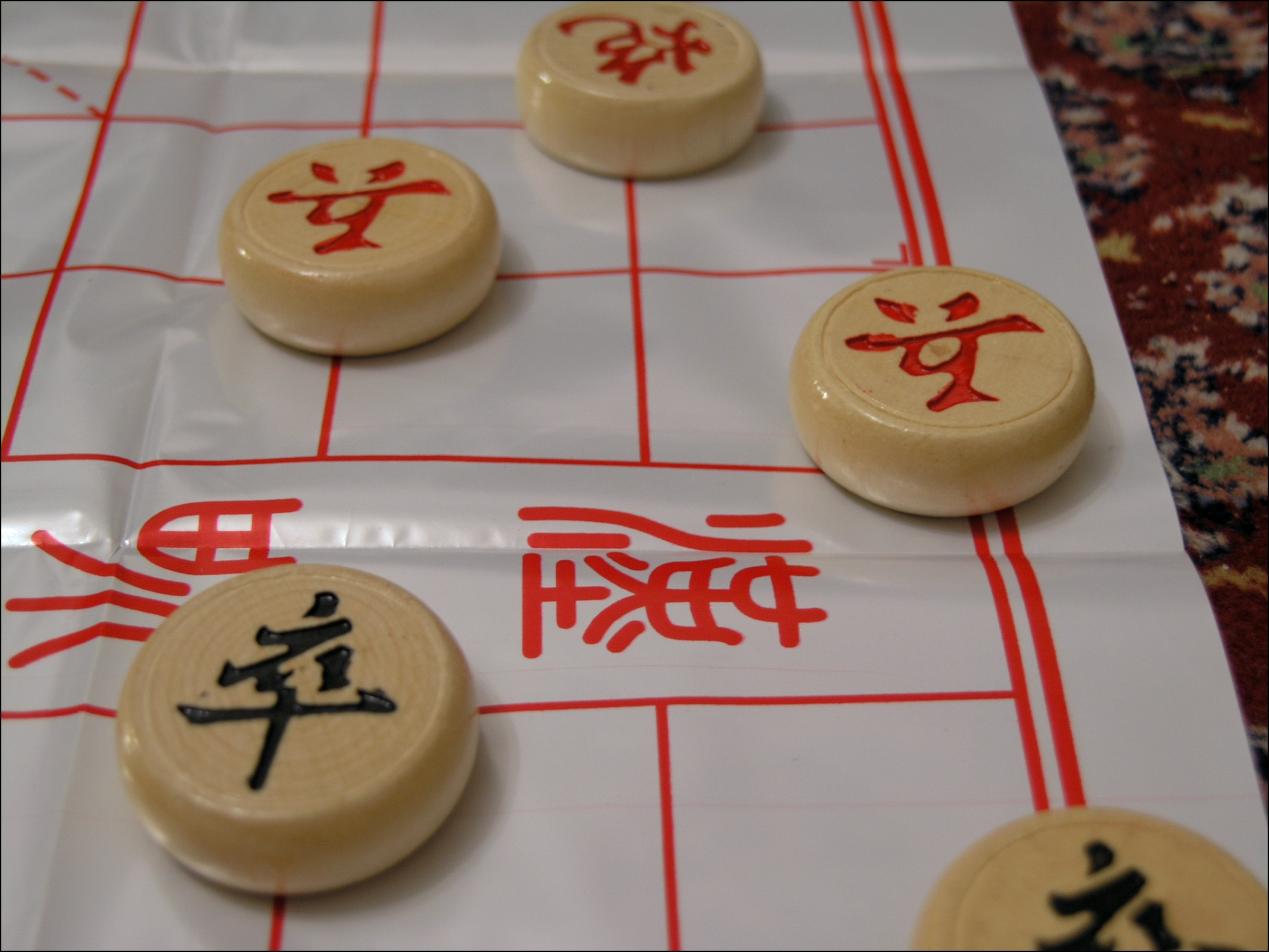 Xiangqi